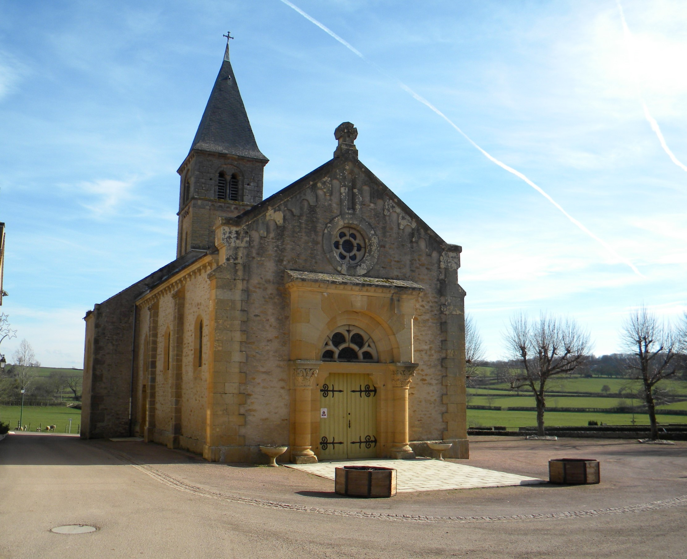 Eglise de Cahmplecy